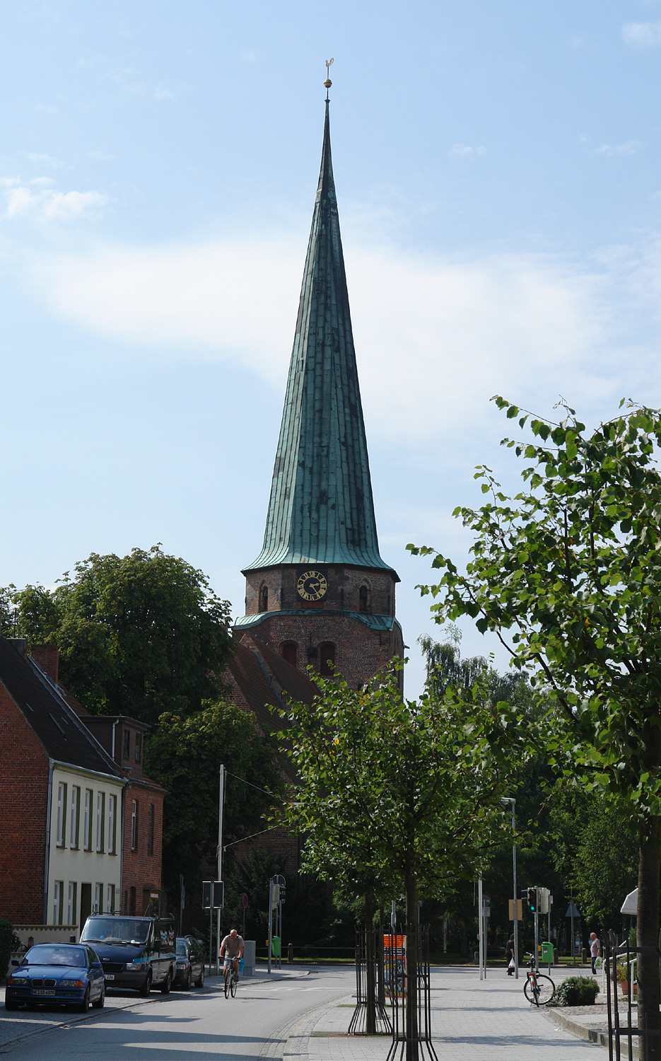 Kirche St. Lorenz (17.Jh.) in Lübeck-Travemünde: Blick aus der Kurgartenstraße (von Osten)